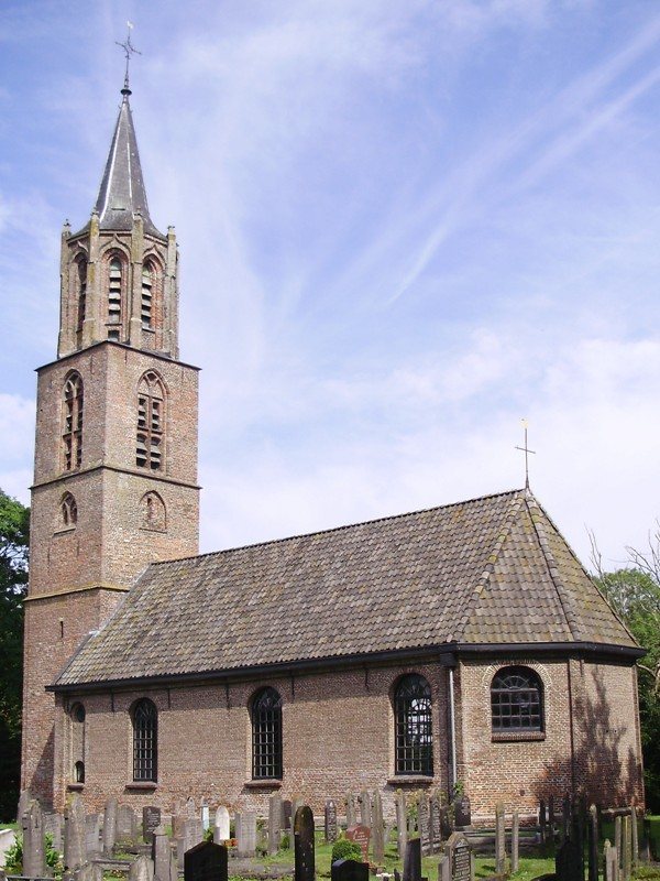 Kerk van Peperga